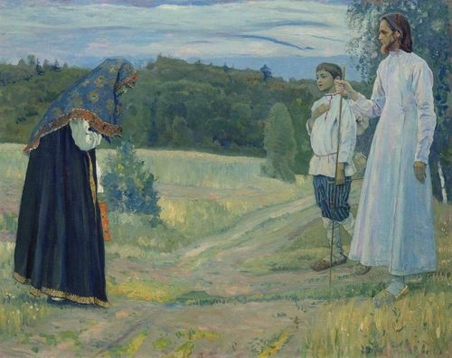 Путник. 1921 Холст, масло. 82.5 x 106 см Тверская областная картинная галерея